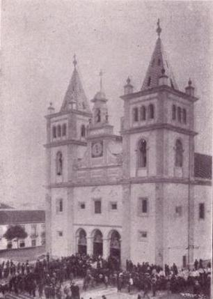 "A Sé de Angra", freguesia da Sé, concelho de Angra do Heroísmo, ilha Terceira, Açores, in Álbum Açoriano, fascículo nº 43, 1903, p. 342.